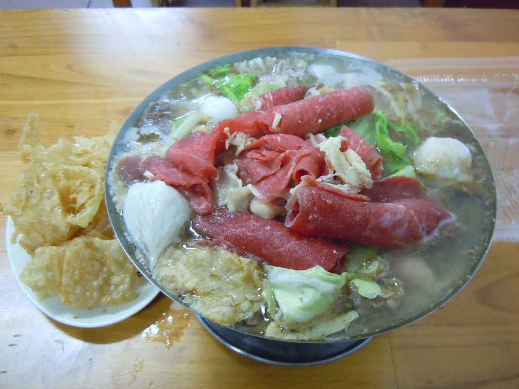 中文（台灣）: 台式迷你火鍋中有牛肉、羊肉、豬肉、鳥蛋、鮮蚵、貢丸、蝦球、高麗菜、冬粉、豆皮、米血、花枝餃、燕餃、蛋餃、蟹棒絲。